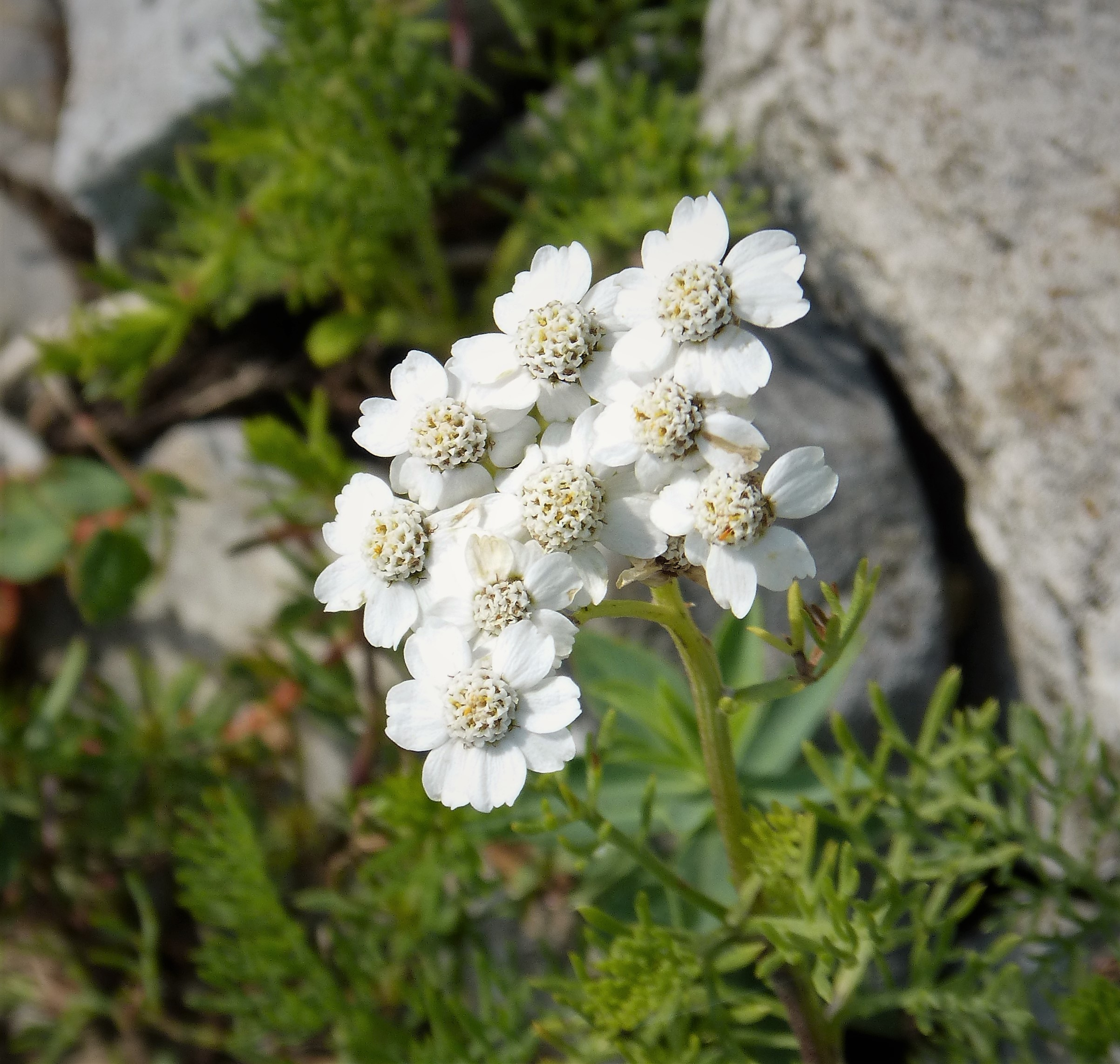 Valbona National Park. Albanian Alps